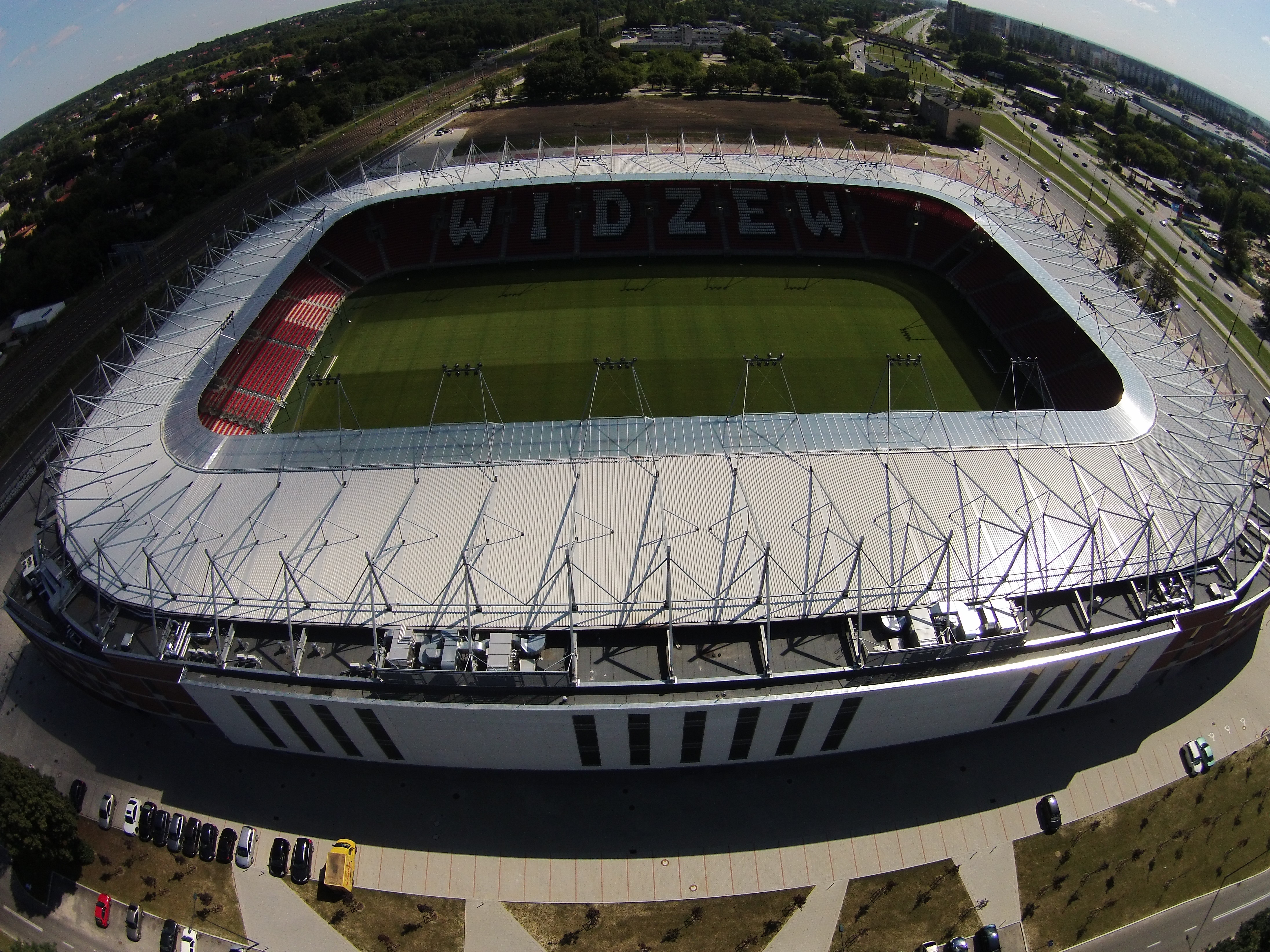 Stadion Widzewa, Widok z lotu drona. Łódź Widzew 29-07-2017